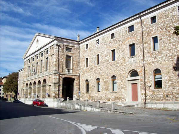 Udine (Friuli Venezia Giulia - Italy), L'Ospedale Vecchio, oggi Palazzo del Tribunale